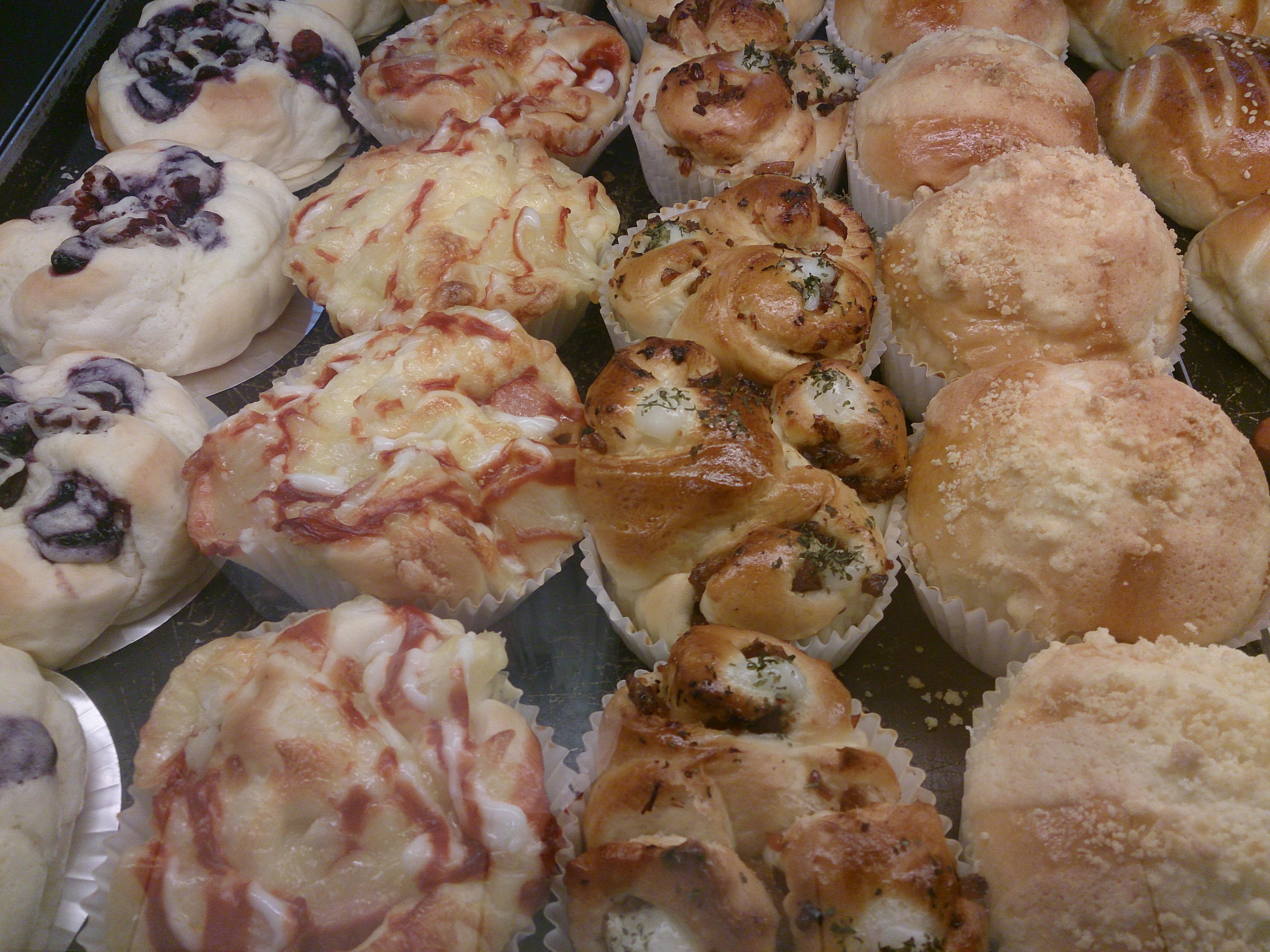 yum yum